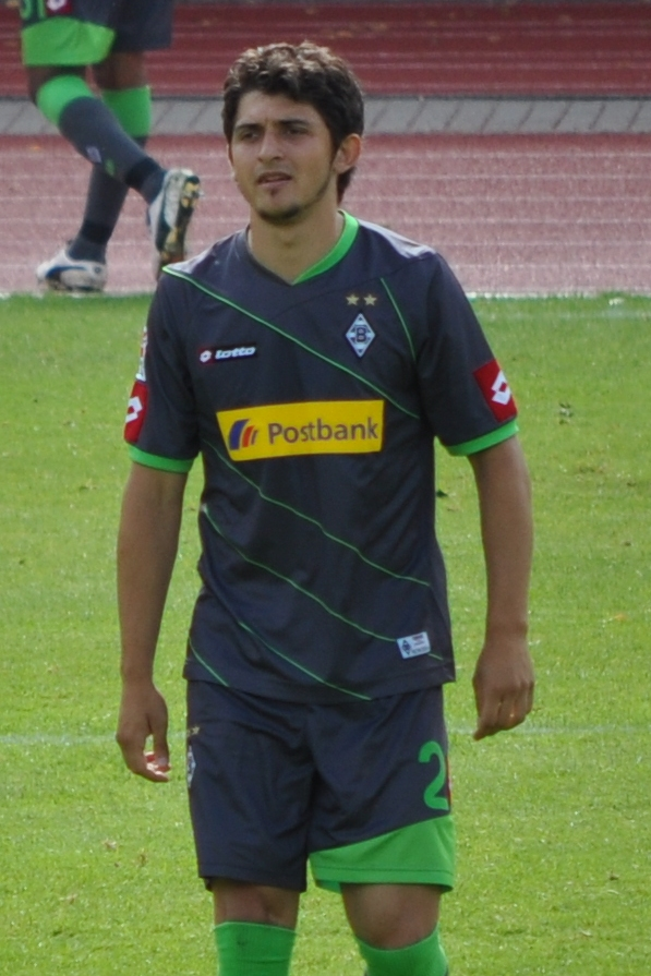 Matthias Zimmermann im Testspiel gegen Aberdeen